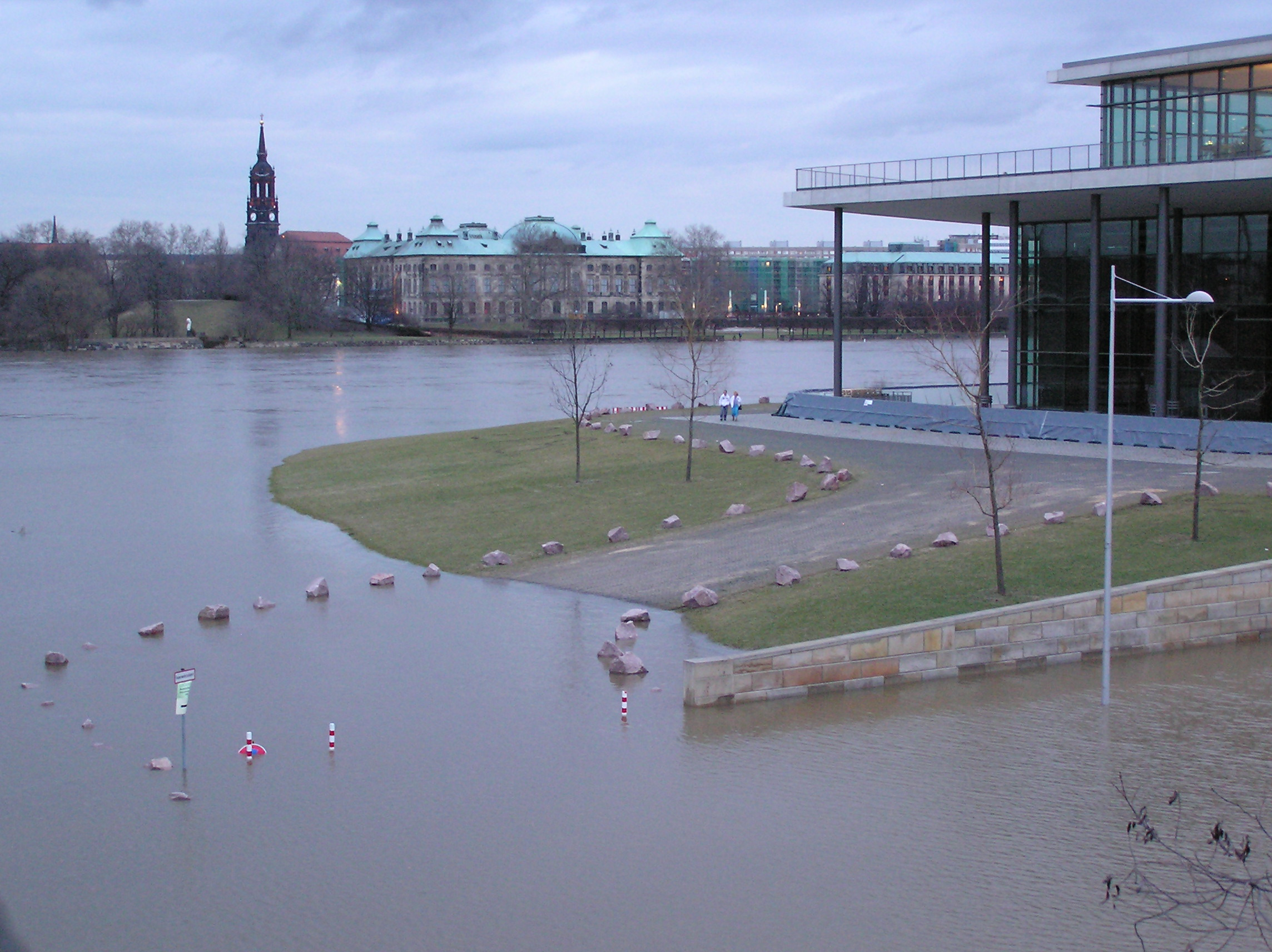 Beschreibung: Flood 2006 in Dresden near Congress Center Quelle: selbst fotografiert am 30.03.2006 Fotograf: Conrad Nutschan